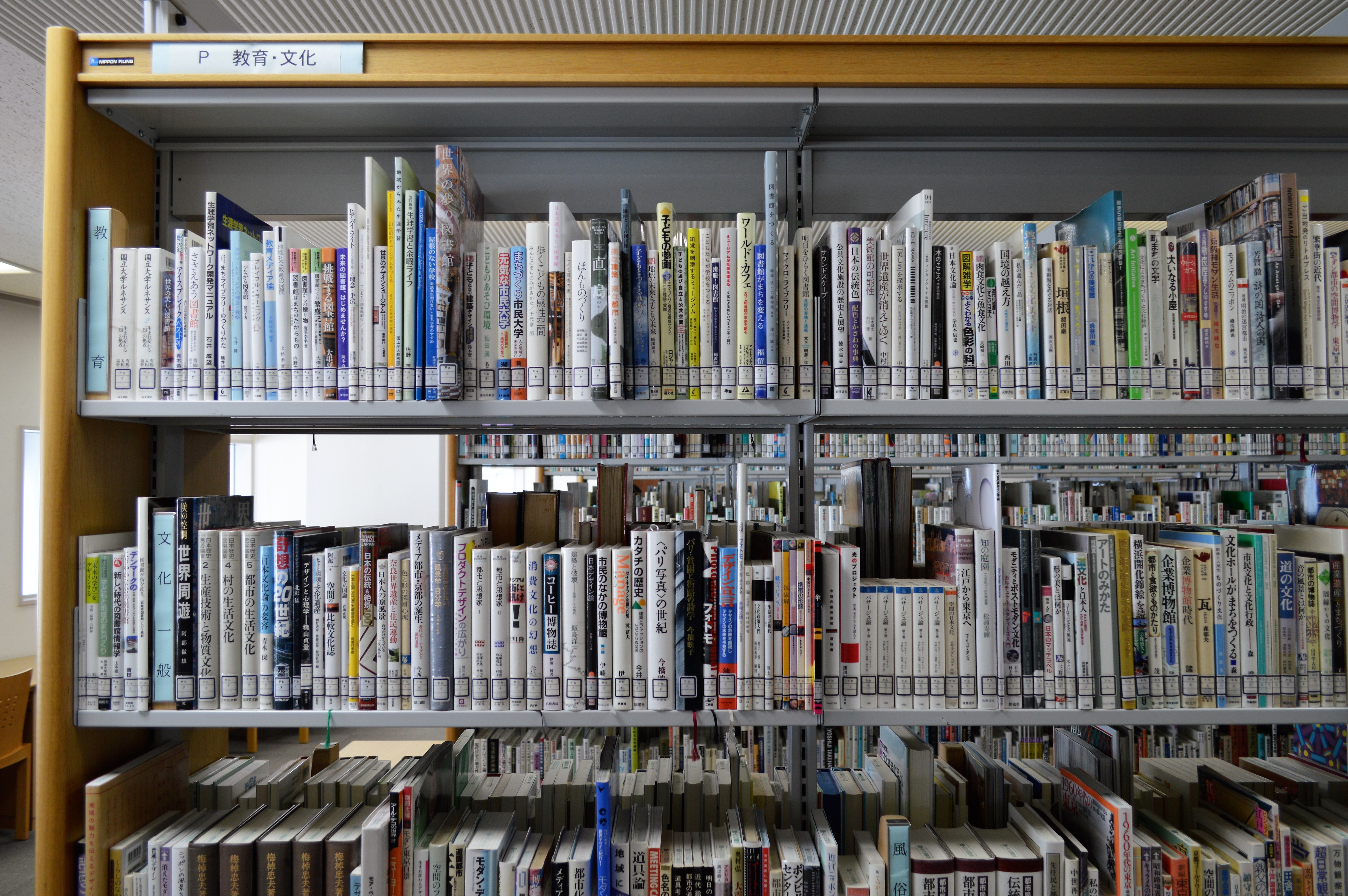 金山南ビル12階にある名古屋都市センターまちづくりライブラリー。